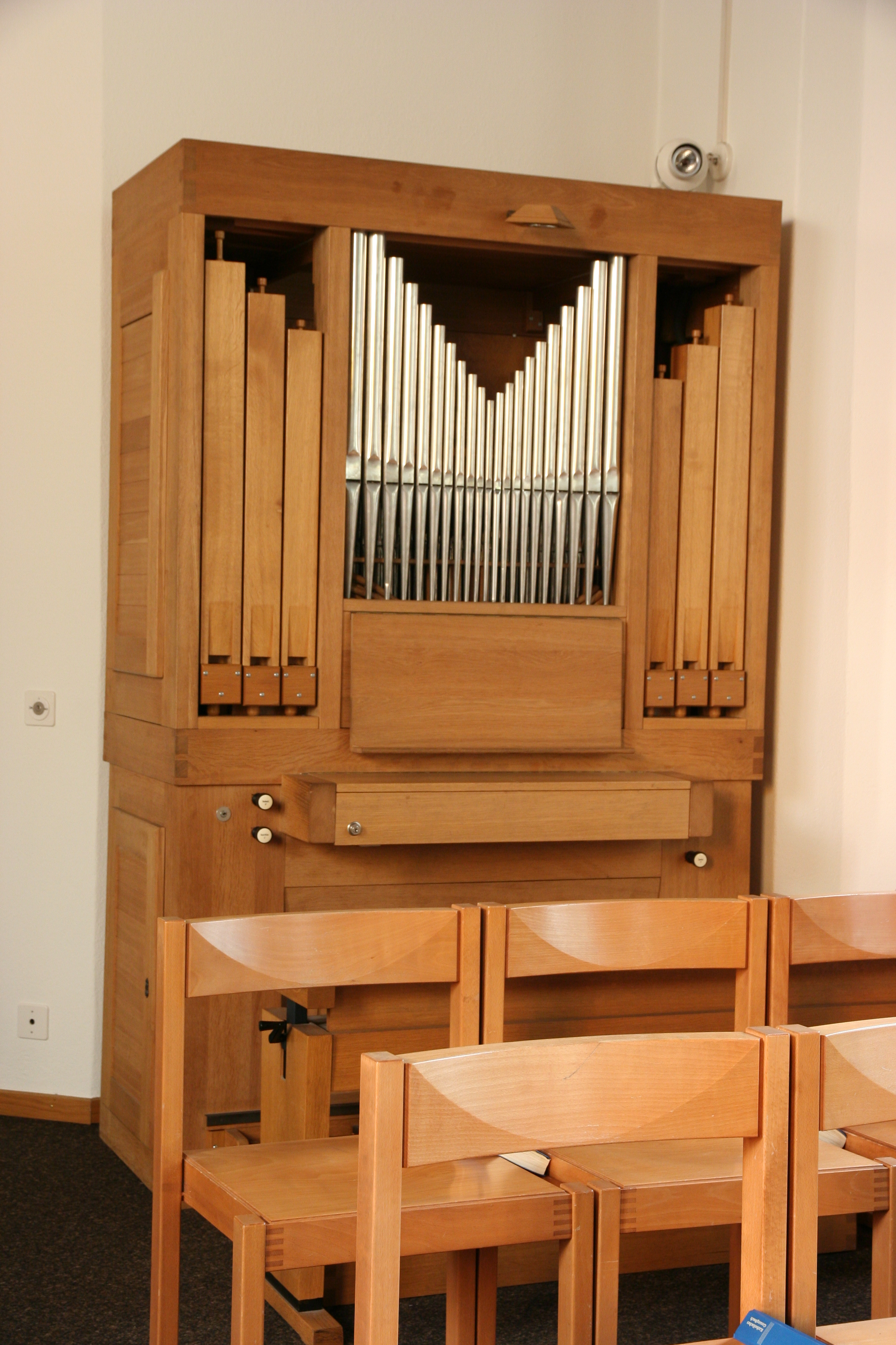 Römisch-katholische Pfarrkirche Hl. Dreifaltigkeit Adliswil, Orgel in der Kapelle